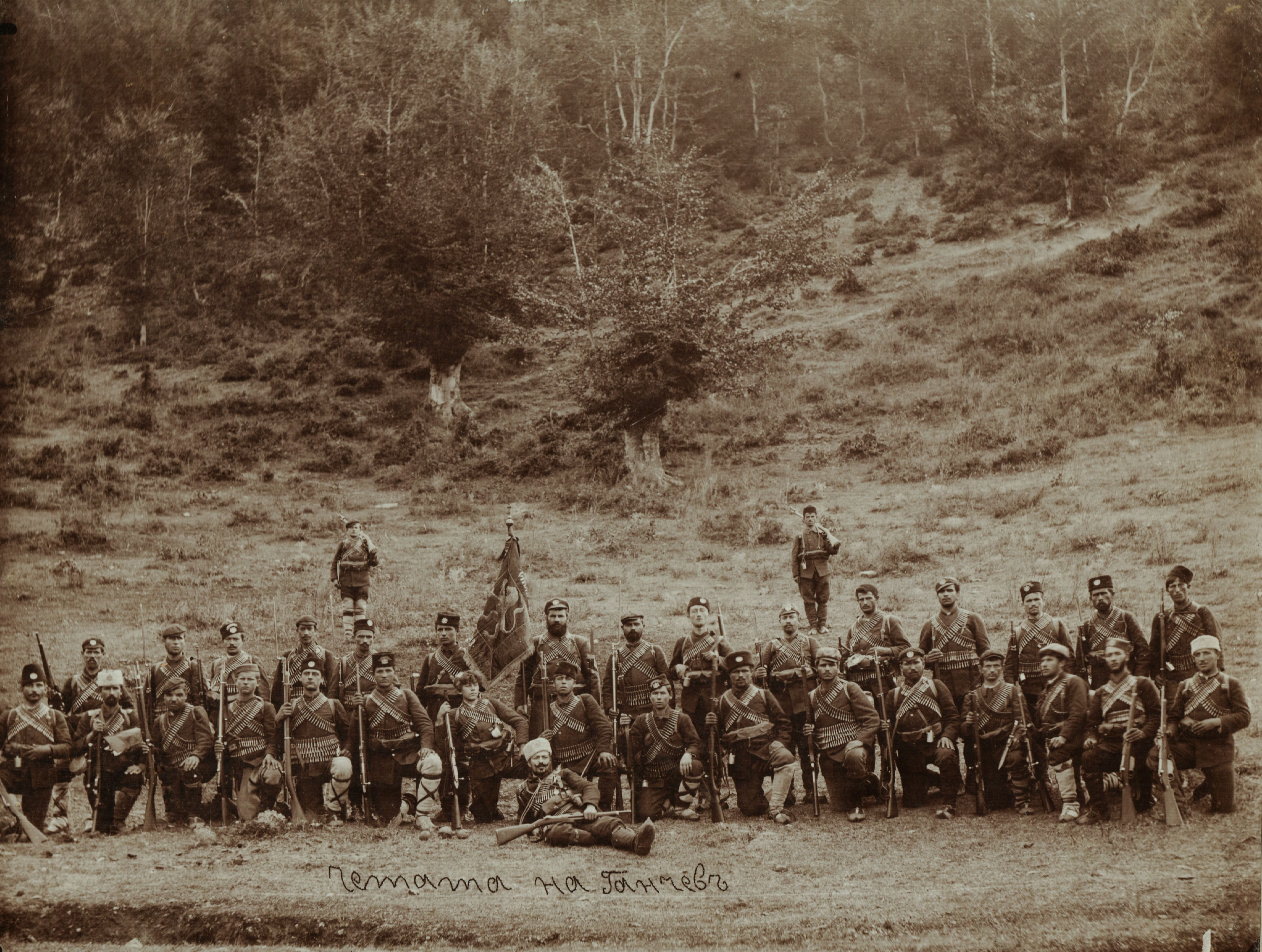 Снимка на четата на Михаил Ганчев